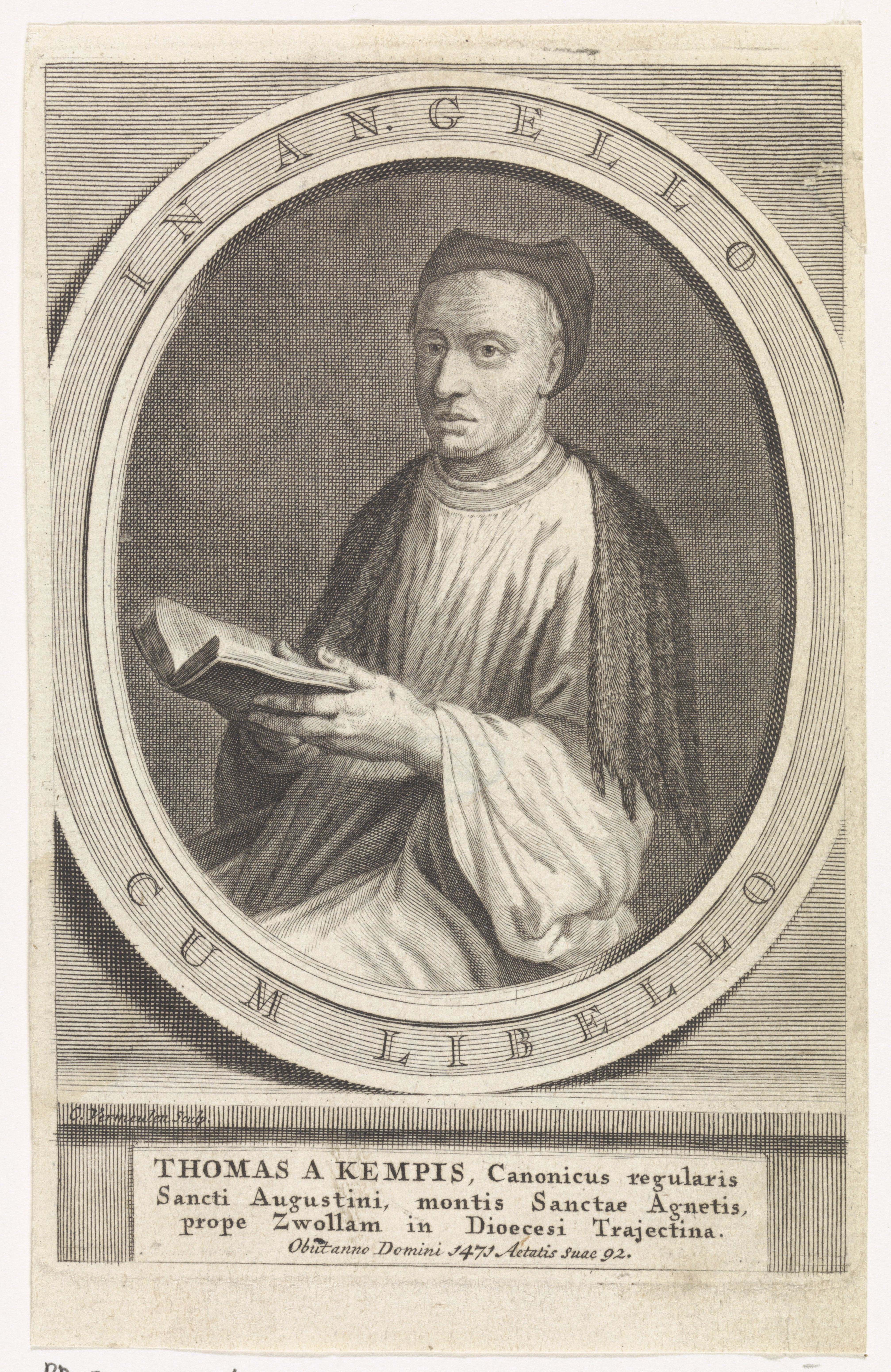 IdentificatieTitel(s): Portret van Thomas à KempisObjecttype: prent Objectnummer: RP-P-1937-1361Catalogusreferentie: Hollstein Dutch 118-2(2)Van Someren 5533Opschriften / Merken: verzamelaarsmerk, verso, gestempeld: Lugt 2228Omschrijving: Portret van Thomas à Kempis, schrijver en monnik in het Agnietenbergklooster bij Zwolle.VervaardigingVervaardiger: prentmaker: Cornelis Martinus Vermeulen (vermeld op object)naar prent van: Abraham BloemaertPlaats vervaardiging: AntwerpenDatering: 1654 - 1709Fysieke kenmerken: gravureMateriaal: papier Techniek: graveren (drukprocedé)Afmetingen: plaatrand: h 131 mm × b 89 mmOnderwerpWie: Thomas à KempisVerwerving en rechtenVerwerving: onbekend 1937Copyright: Publiek domein